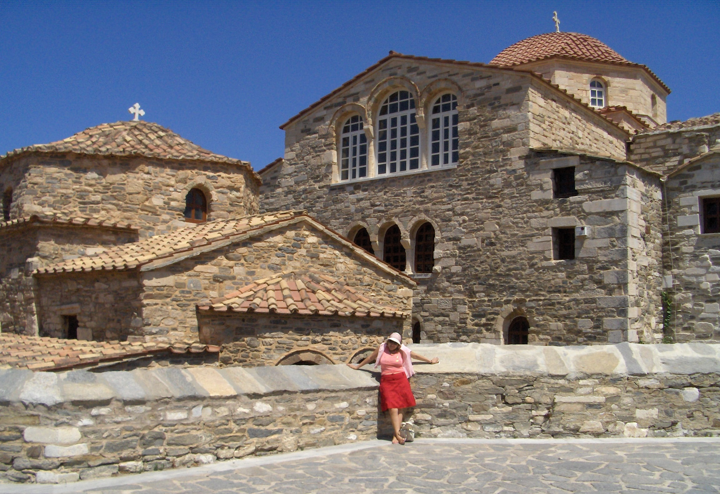 Η εκκλησία Παναγία η Εκατονταπυλιανή στην Πάρο.